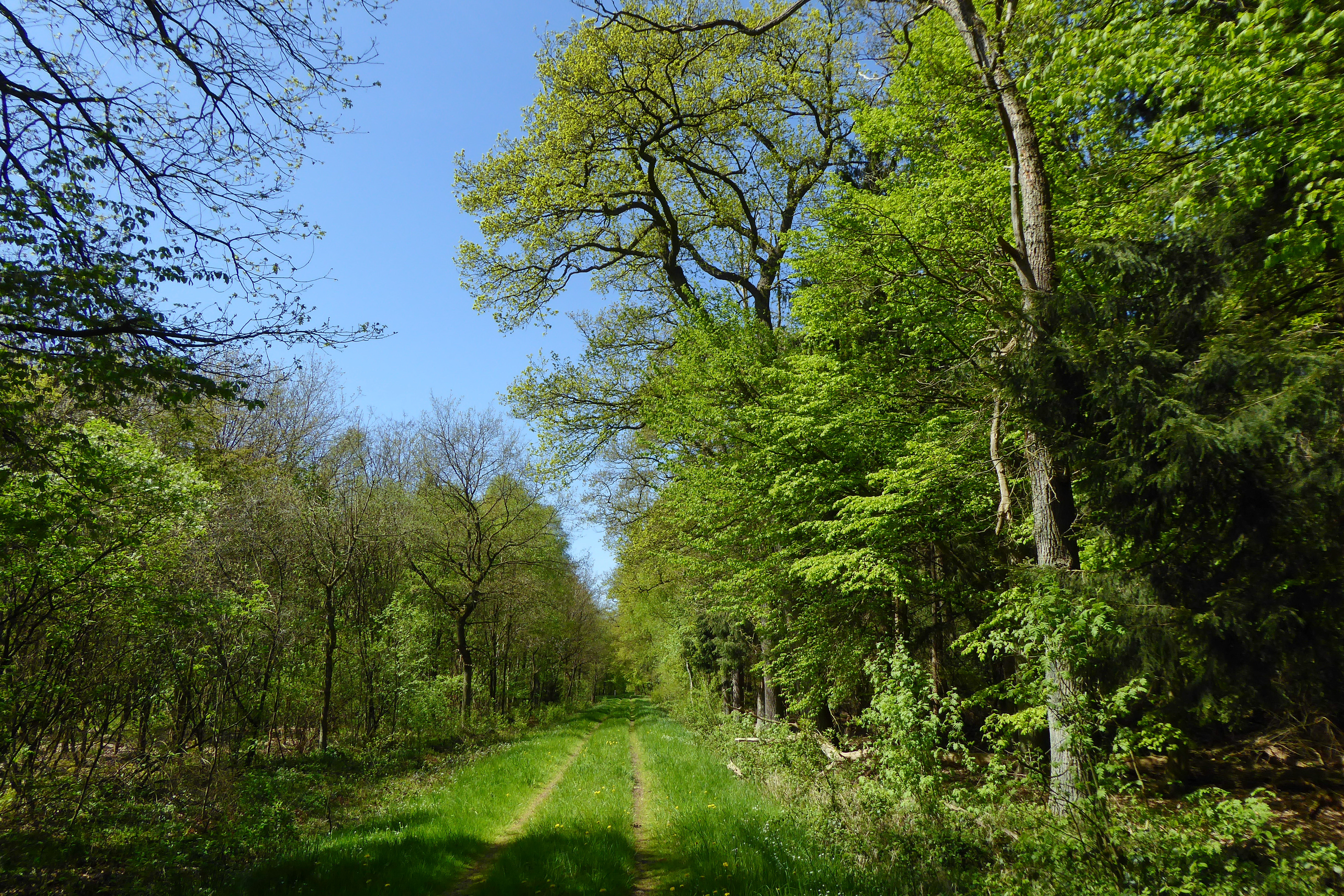 Mitten durch das FFH-Gebiet Hellern bei Wietze führt ein Waldweg, der Fußgängern und Radfahrern dieses Waldgebiet erschließt. Seit dem 29.10.2018 ist das FFH-Gebiet auch ein Naturschutzgebiet, "Hellern bei Wietze" (NSG LÜ 309).